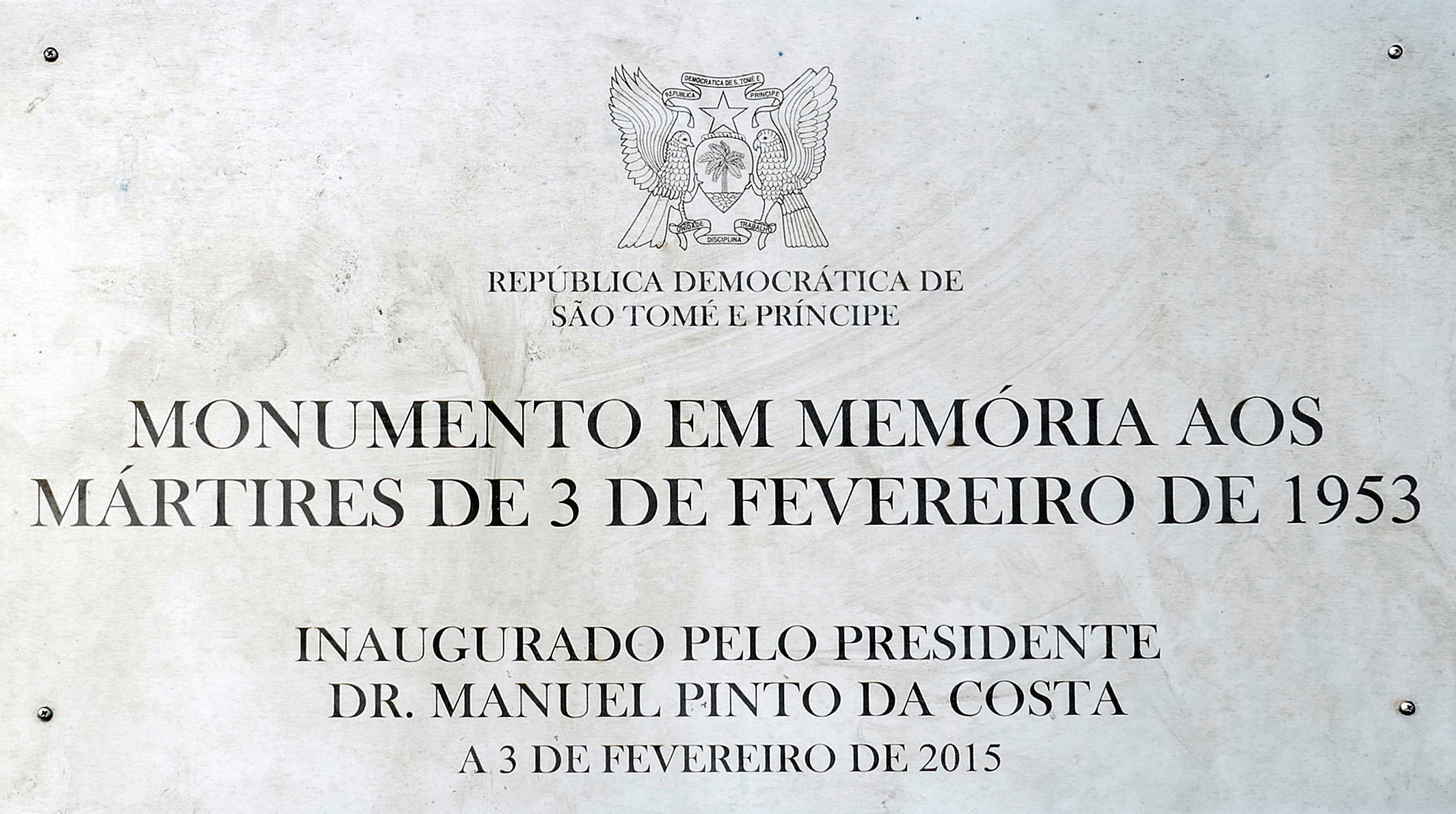 Monument à la mémoire des martyrs du 3 février 1953, érigé en 2015 sur la plage de Fernão Dias, au nord de l'île de São Tomé.